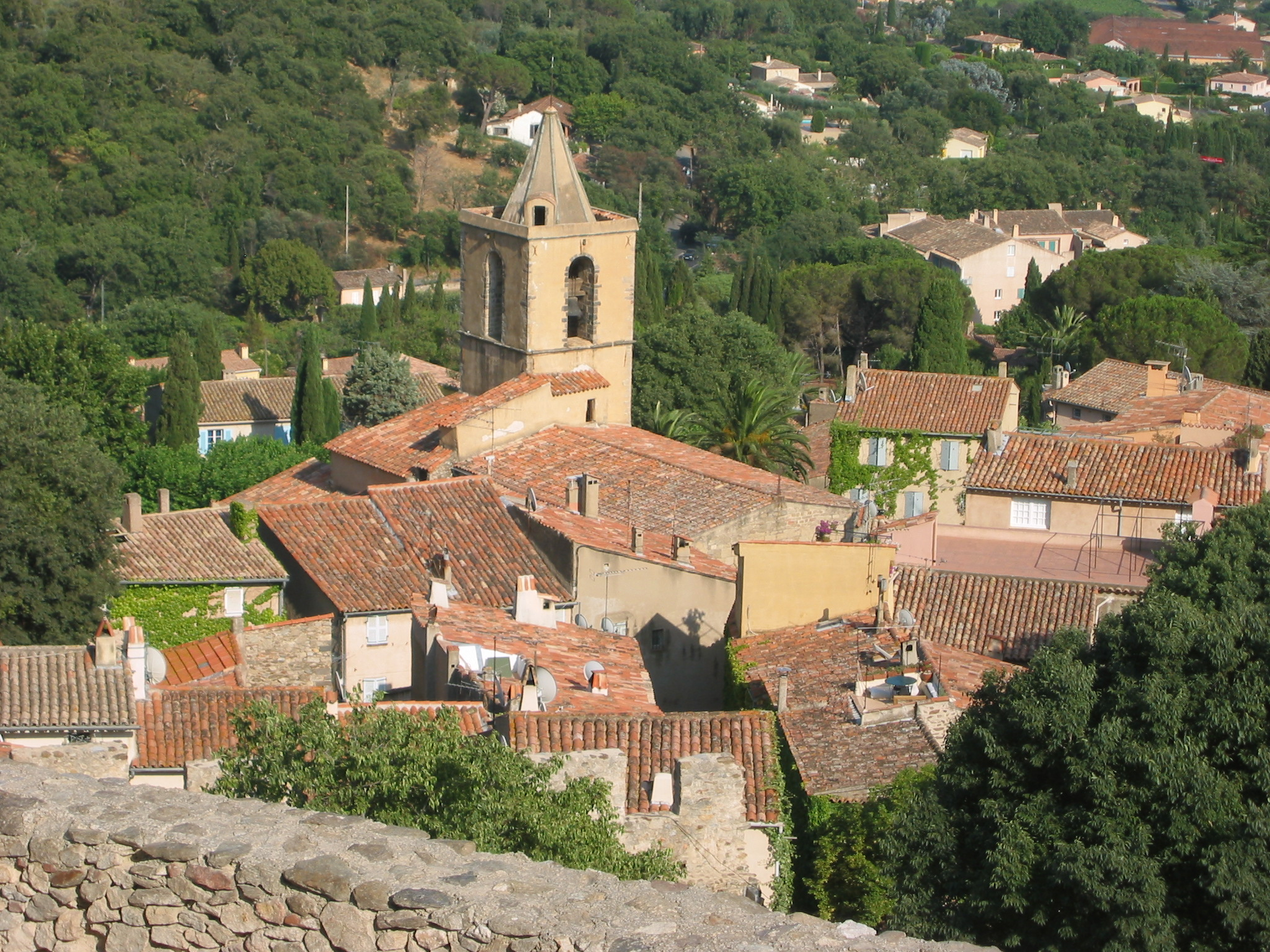 Grimaud, Var, France Le village vu depuis le château. 5 juillet 2006 Author : civodule